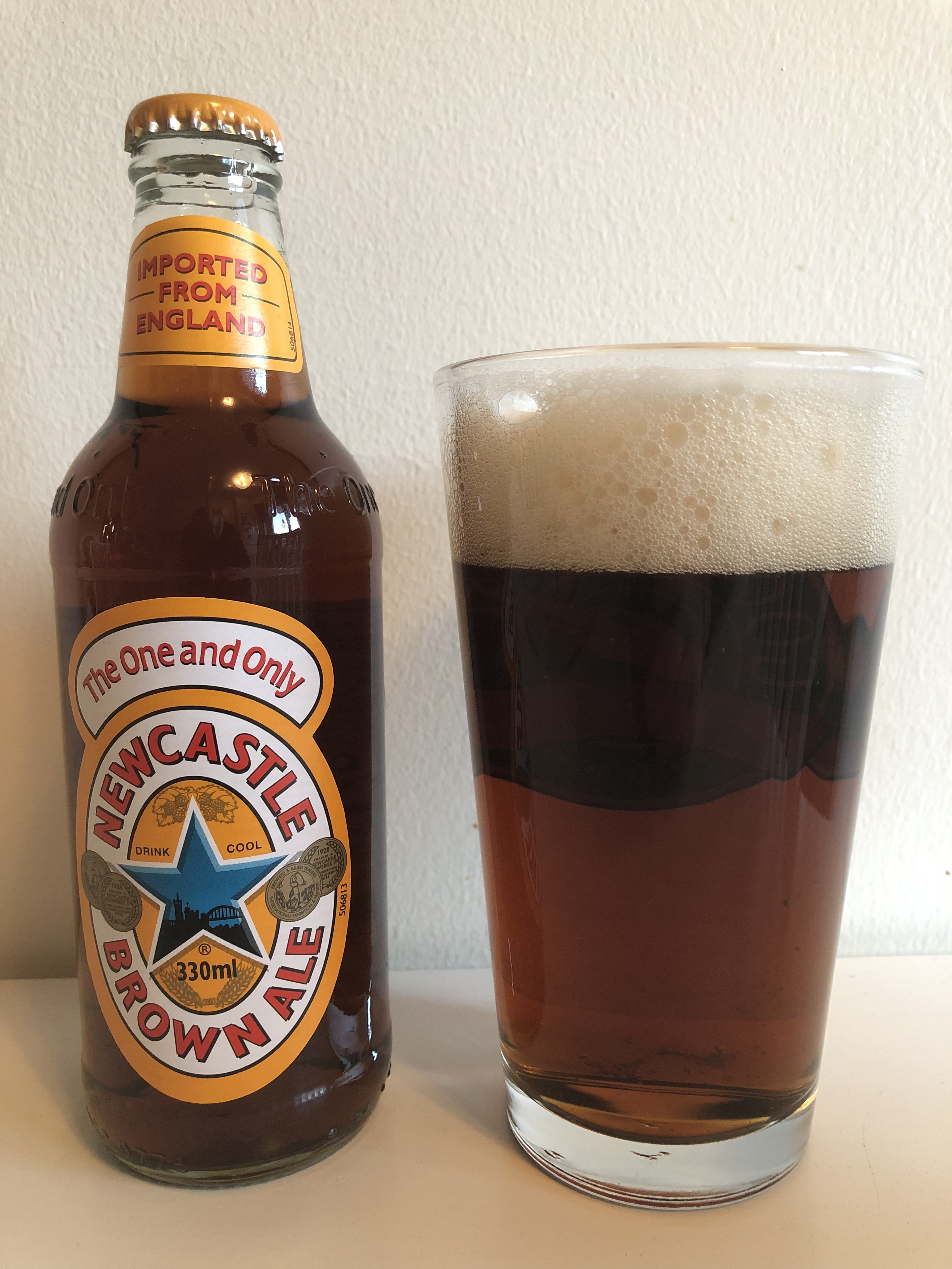 Newcastle Brown Ale upphälld i pintglas